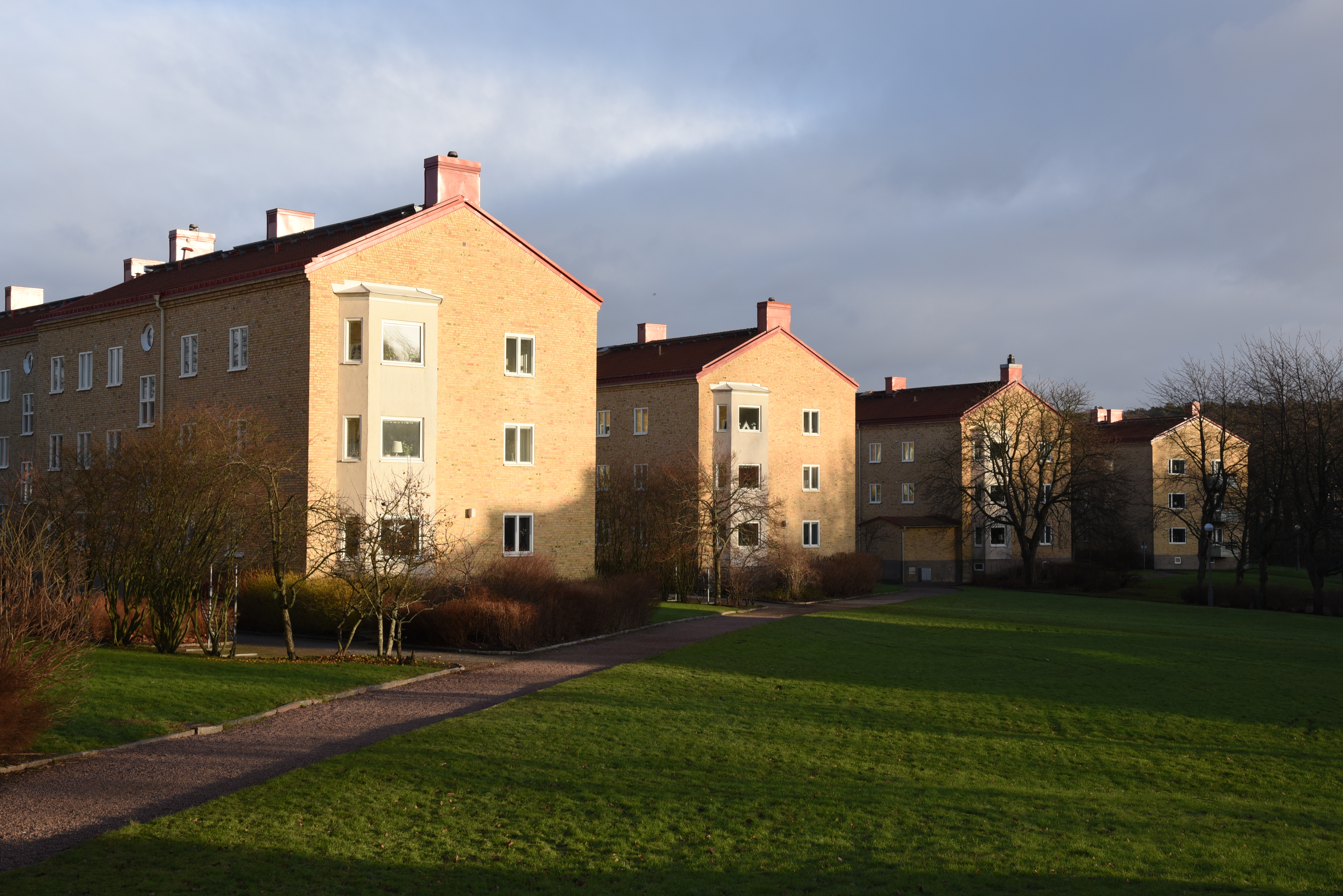 Kvarteret Smaragdödlan i stadsdelen Bö i Göteborg.